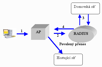 Schéma funkce protokolu 802.1X